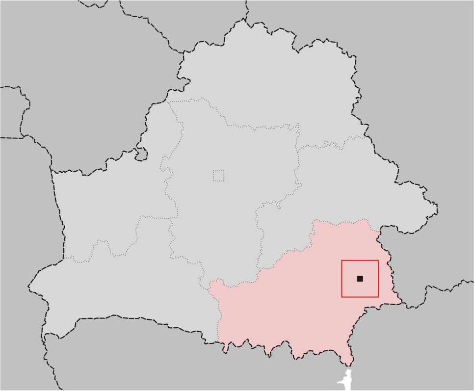 Lage der weißrussischen Stadt Homel